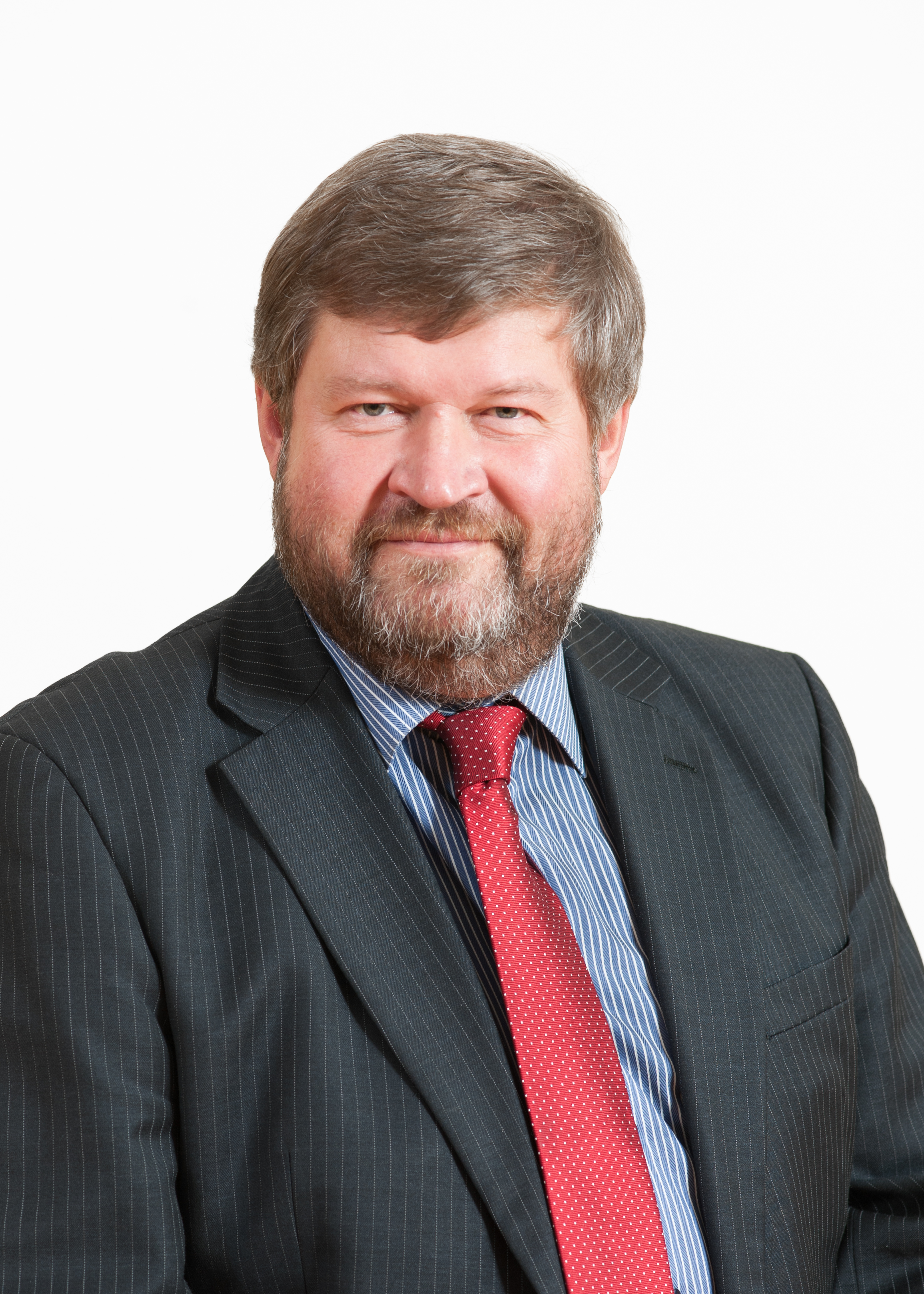 Mart Nutt